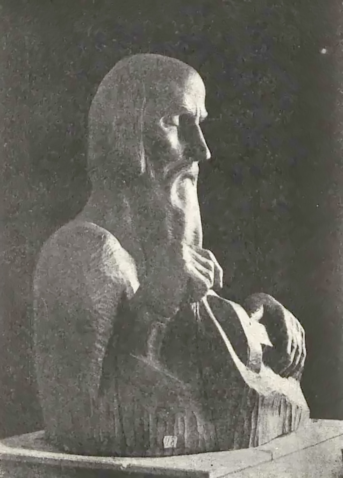 В. Ластоўскі. Мікола Шчакаціхін. Сучаснае беларускае мастацтва.